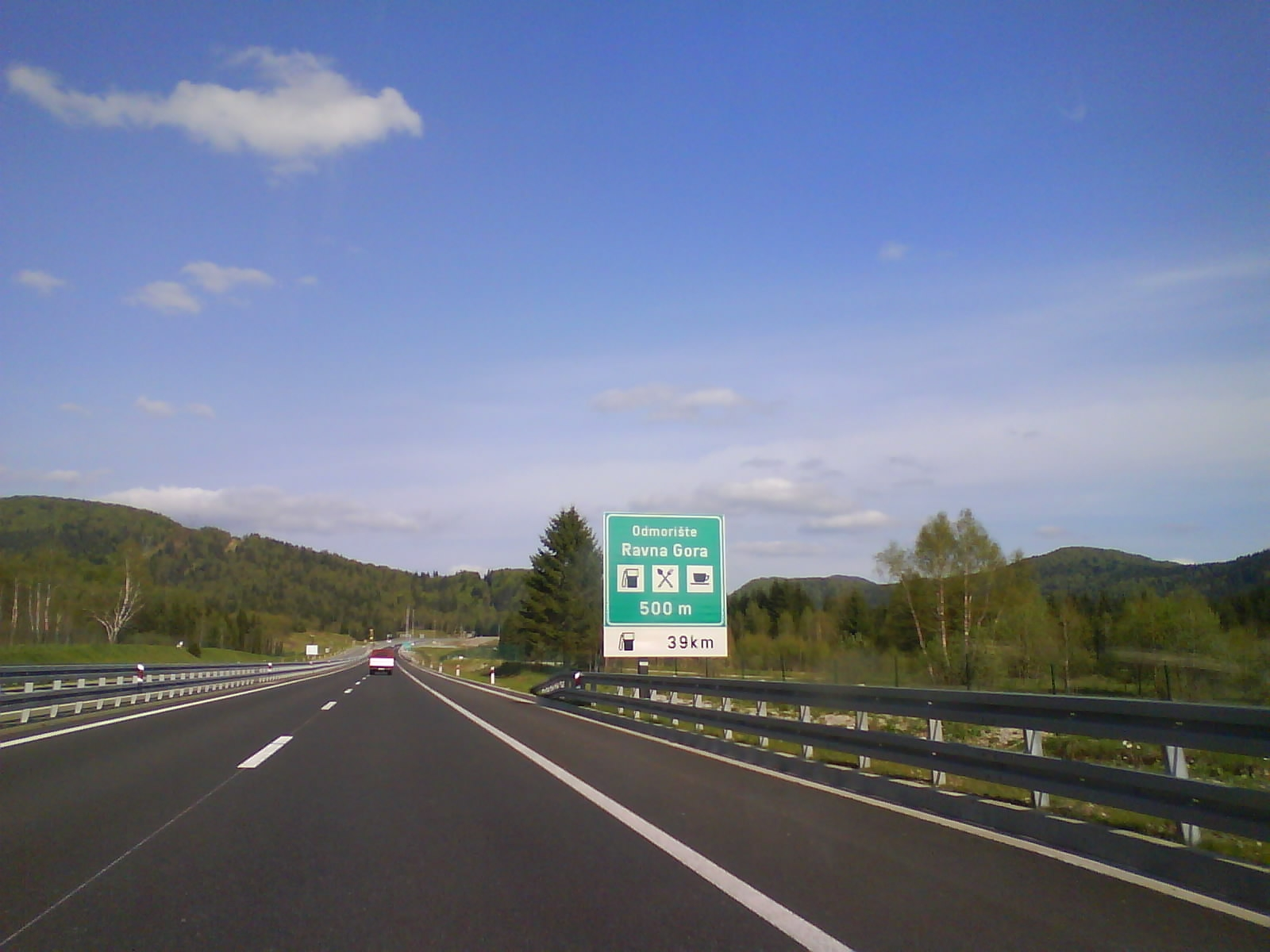 Odmorište Ravna Gora